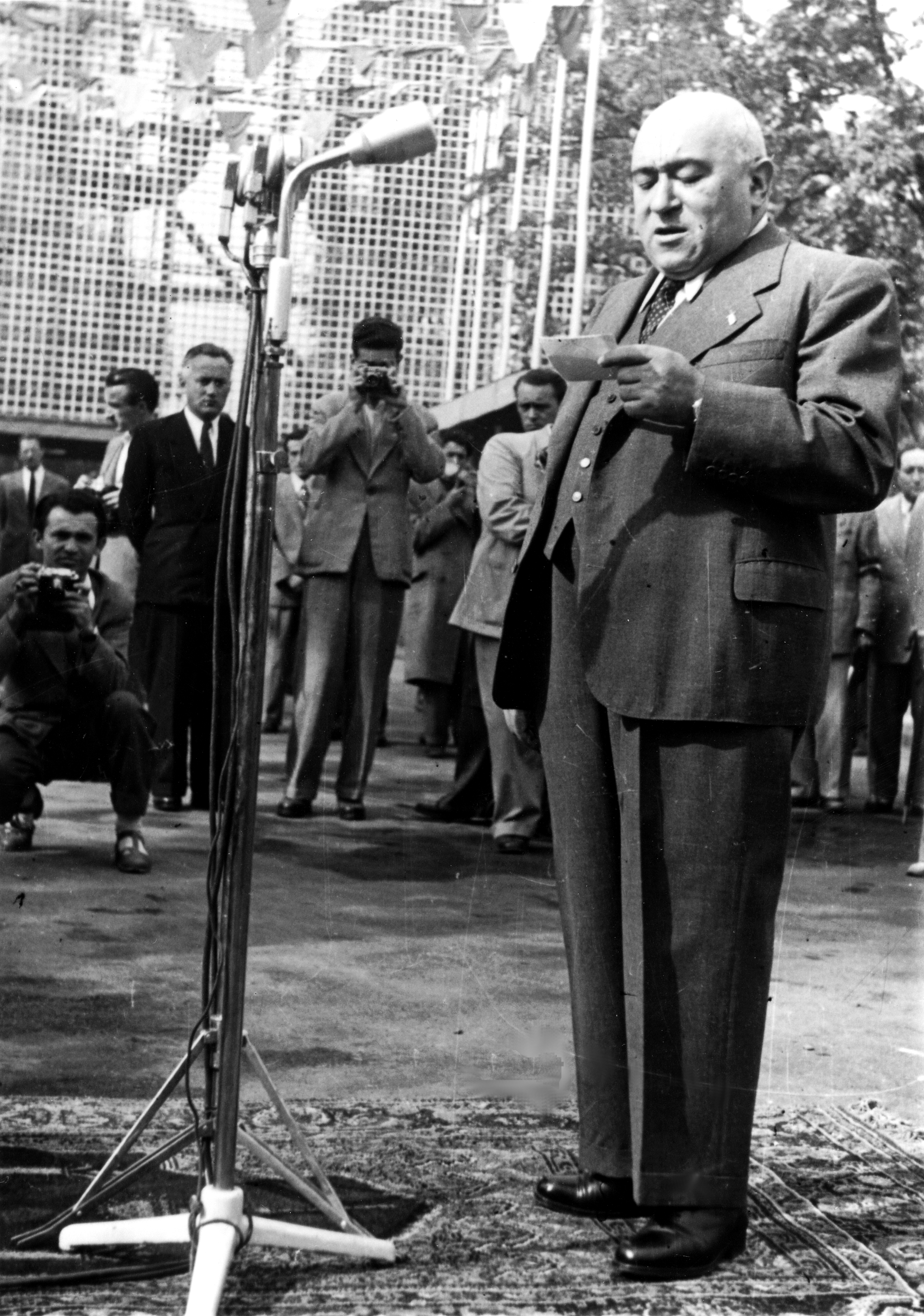 BUDAPEST XIV., VÁROSLIGET BUDAPESTI NEMZETKÖZI VÁSÁR megnyitó 1948. június 11-én, Rákosi Mátyás beszél.